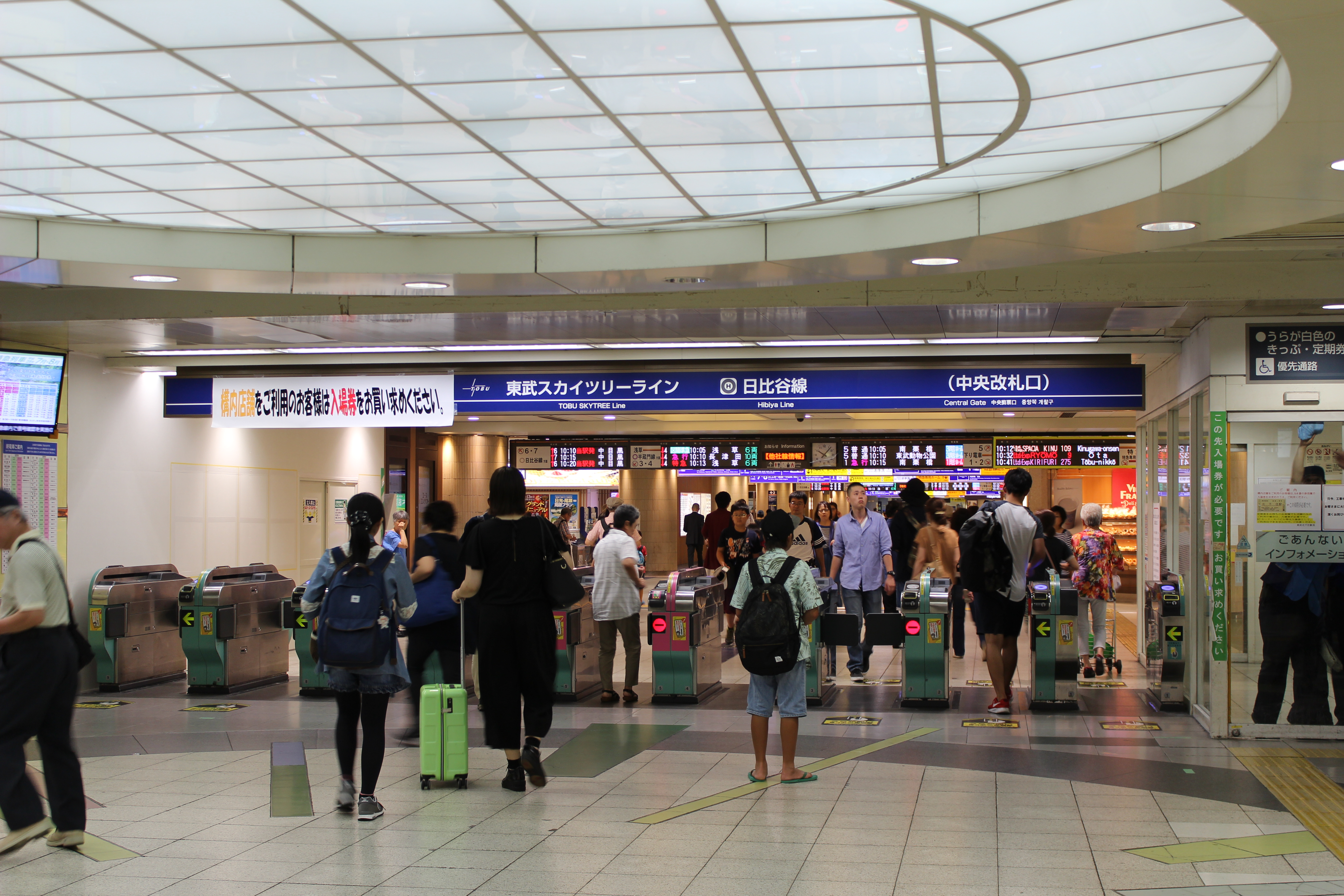 東武北千住駅中央改札口